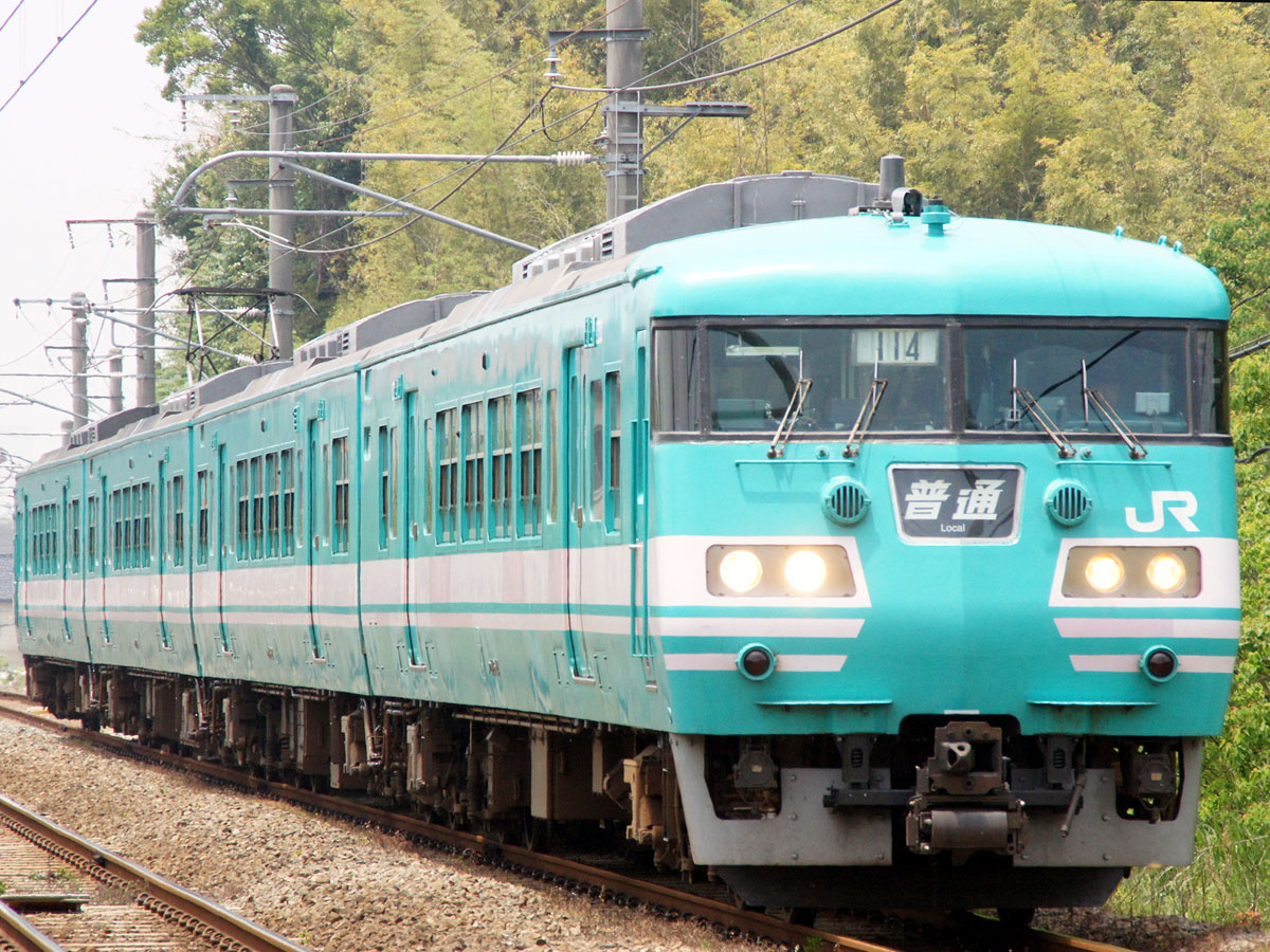 JR西日本117系（きのくに線）